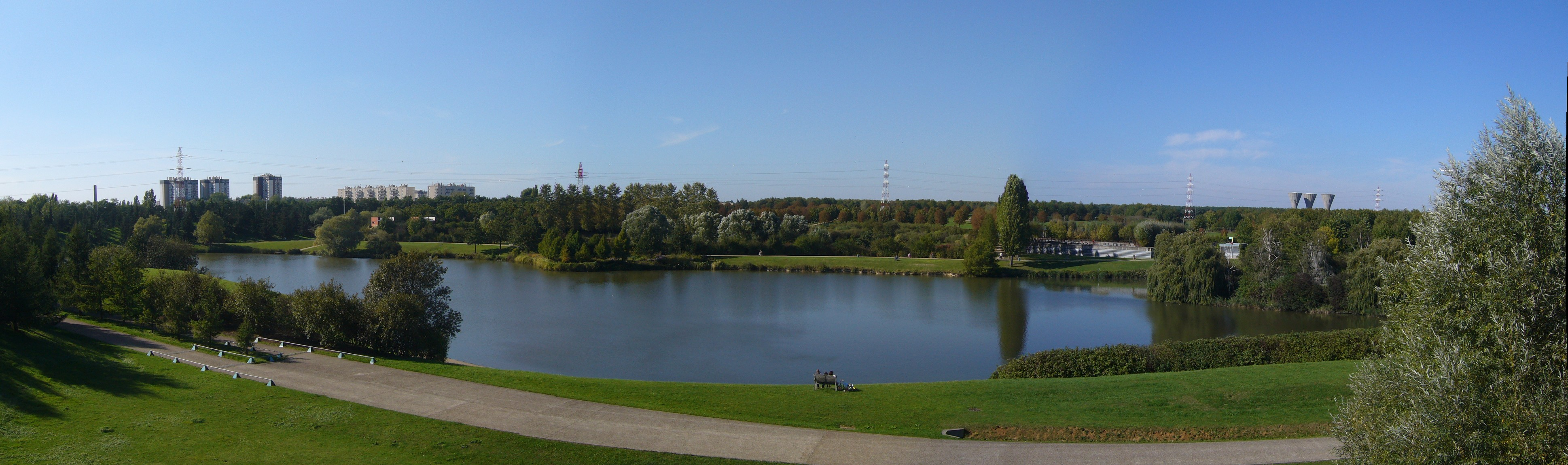 Vue du parc départemental du Sausset à Aulnay-sous-bois (France) / Panoramic view of "parc départemental du Sausset" in Aulnay-sous-Bois (Seine-Saint-Denis, France).